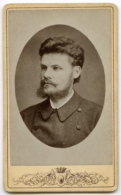 Carl Heinrich Niggol